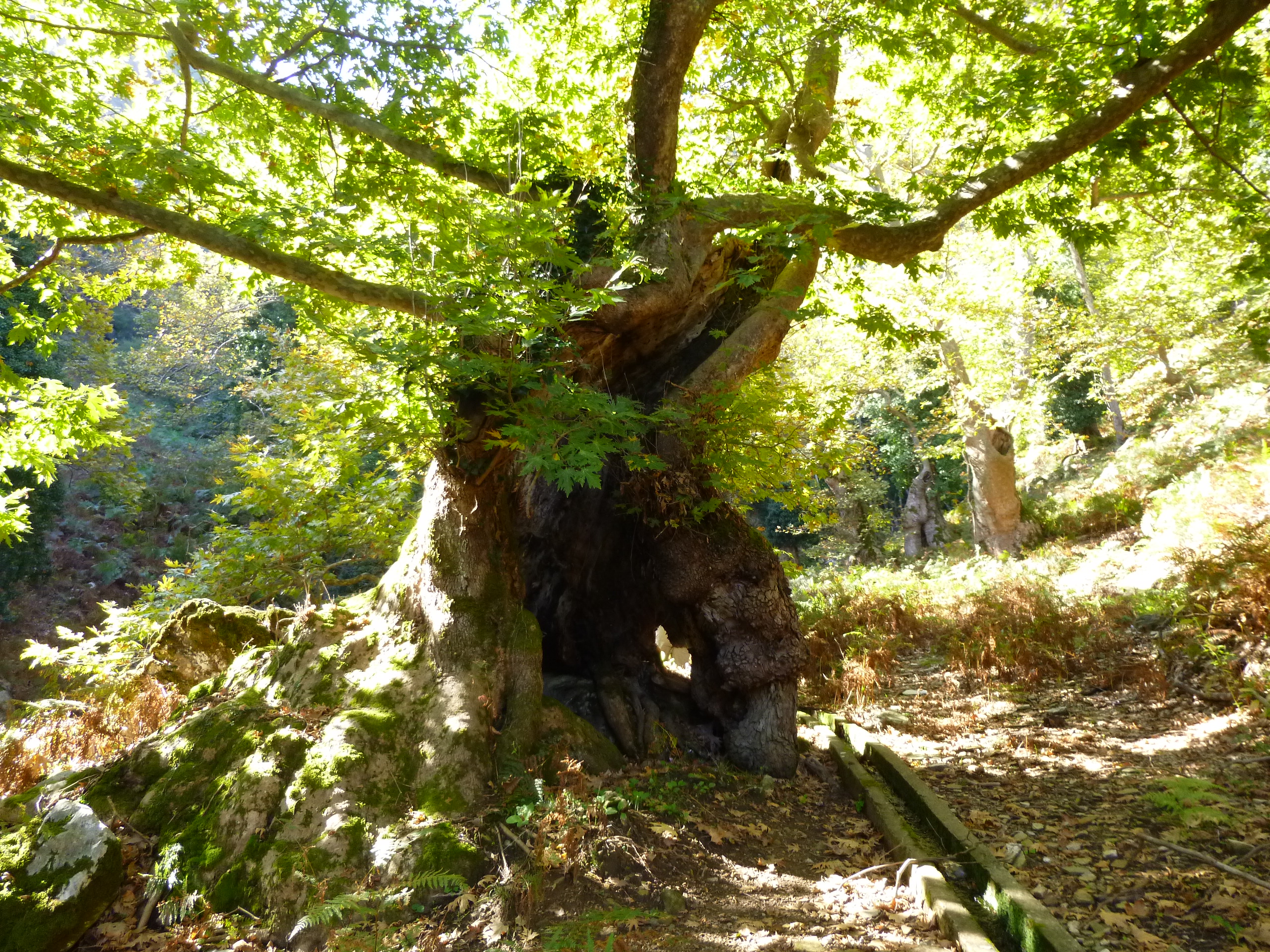 Morgenländische Platane (platanus orientalis) auf der griechischen Insel Thassos im Herbstlicht.